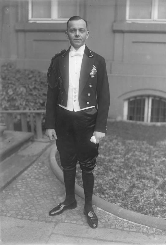 Der Neujahrs-Empfang beim Reichspräsidenten von Hindenburg! Der Leibdiener des Reichspräsidenten von Hindenburg in der Gala-Livrée des Empfanges der ausländischen Diplomaten.